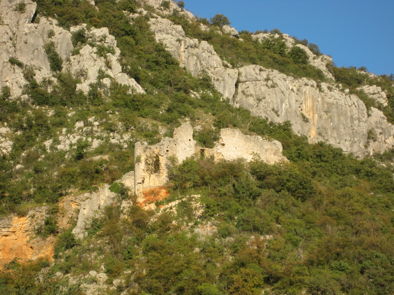 Gradina Grižane, Croatia